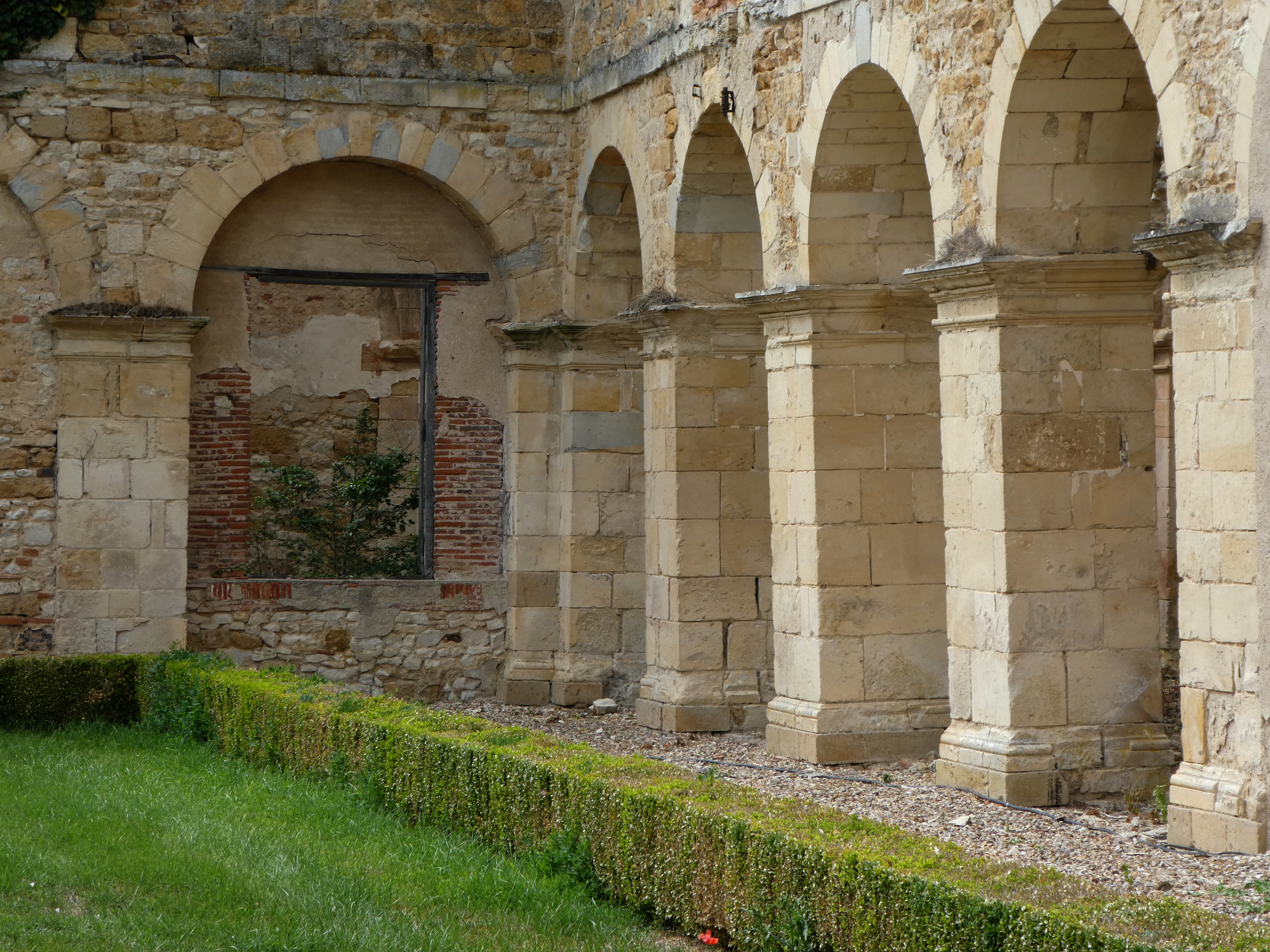 Aile nord du cloître